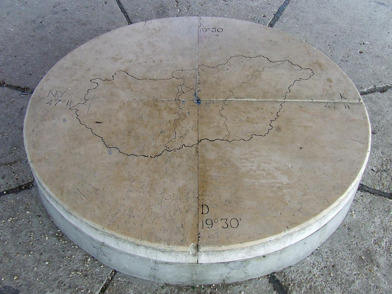 Pusztavacs mellett Magyarország földrajzi középpontja